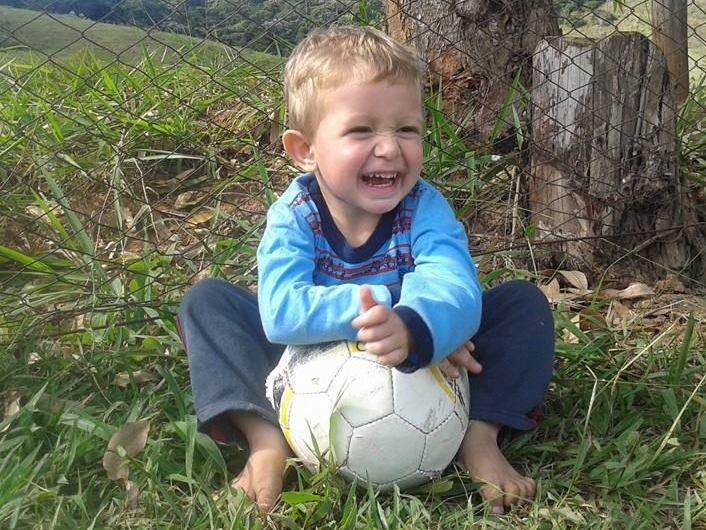 Menino brinca descalço em meio á natureza, foto tirada nos campos da Zona da Mata -MG